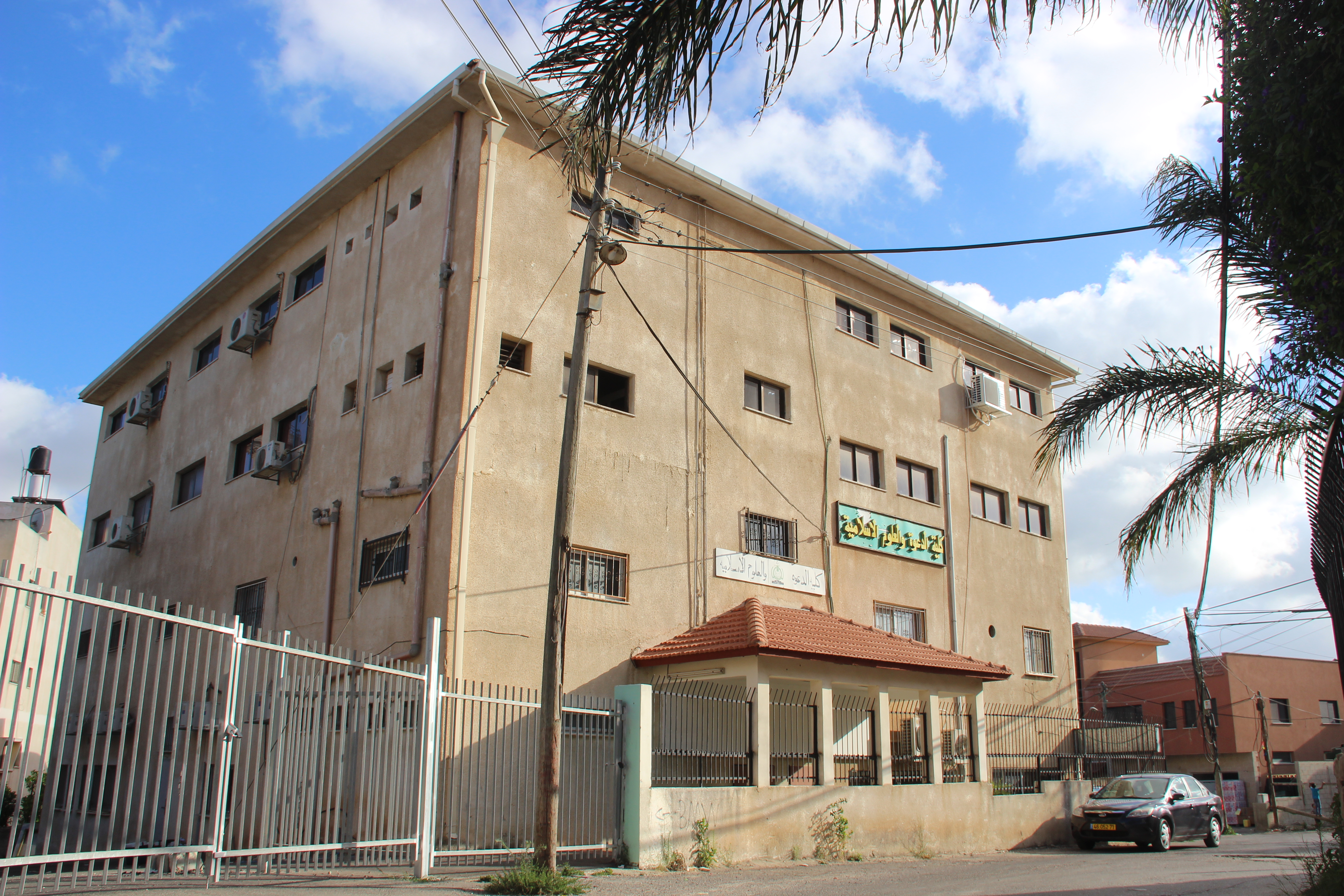 كلية الدعوة والعلوم الاسلامية ام الفحم